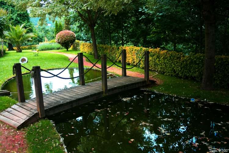 Festas orgasmicas dos fidalgos modernos do Solar Beirós. Festa privadas, ao estilo "Wide-cut Shut" no Solar de Beirós na senda da velha tradição da lavagem da "fonte das virgens", situada no pátio interno da casa que se vê na fotografia.